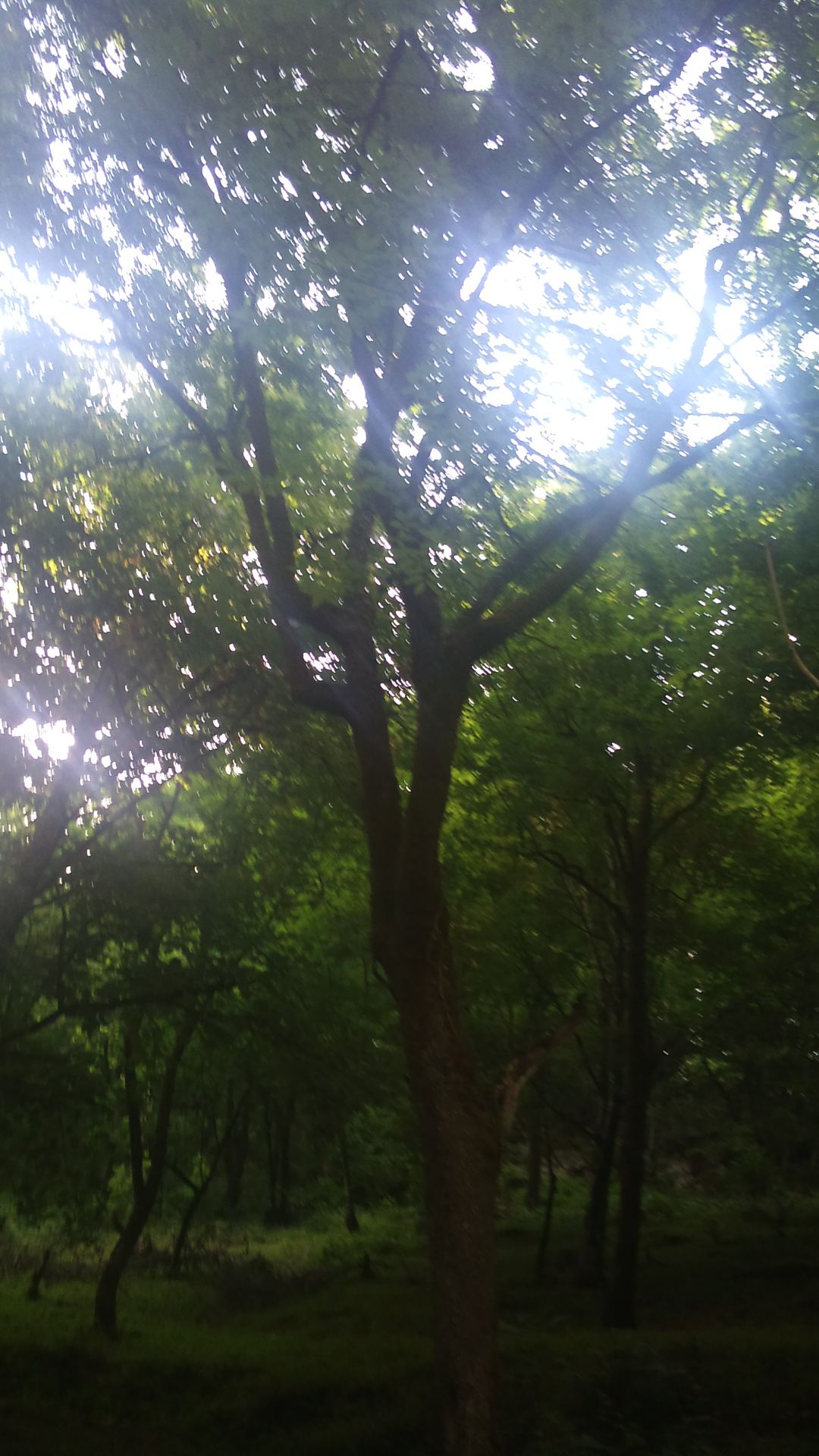 جنگل گیلان